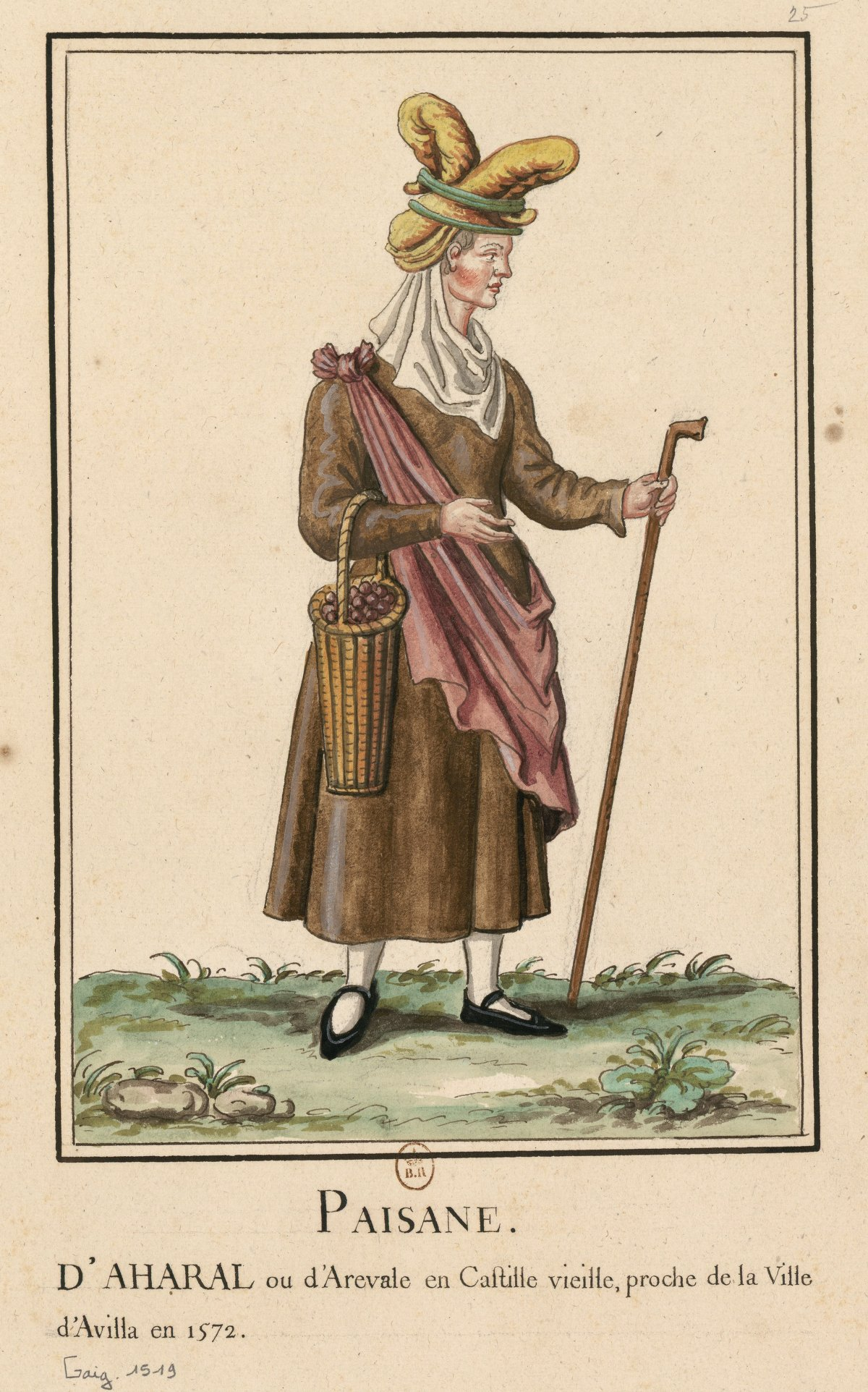 Paysanne des environs d'Avila